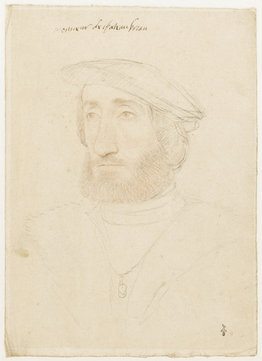 Jean de Laval, comte de Châteaubriant